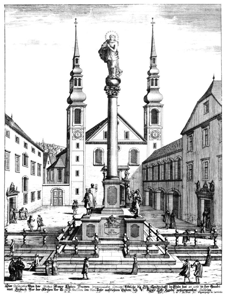 Marijin steber pred cerkvijo sv. Jakoba